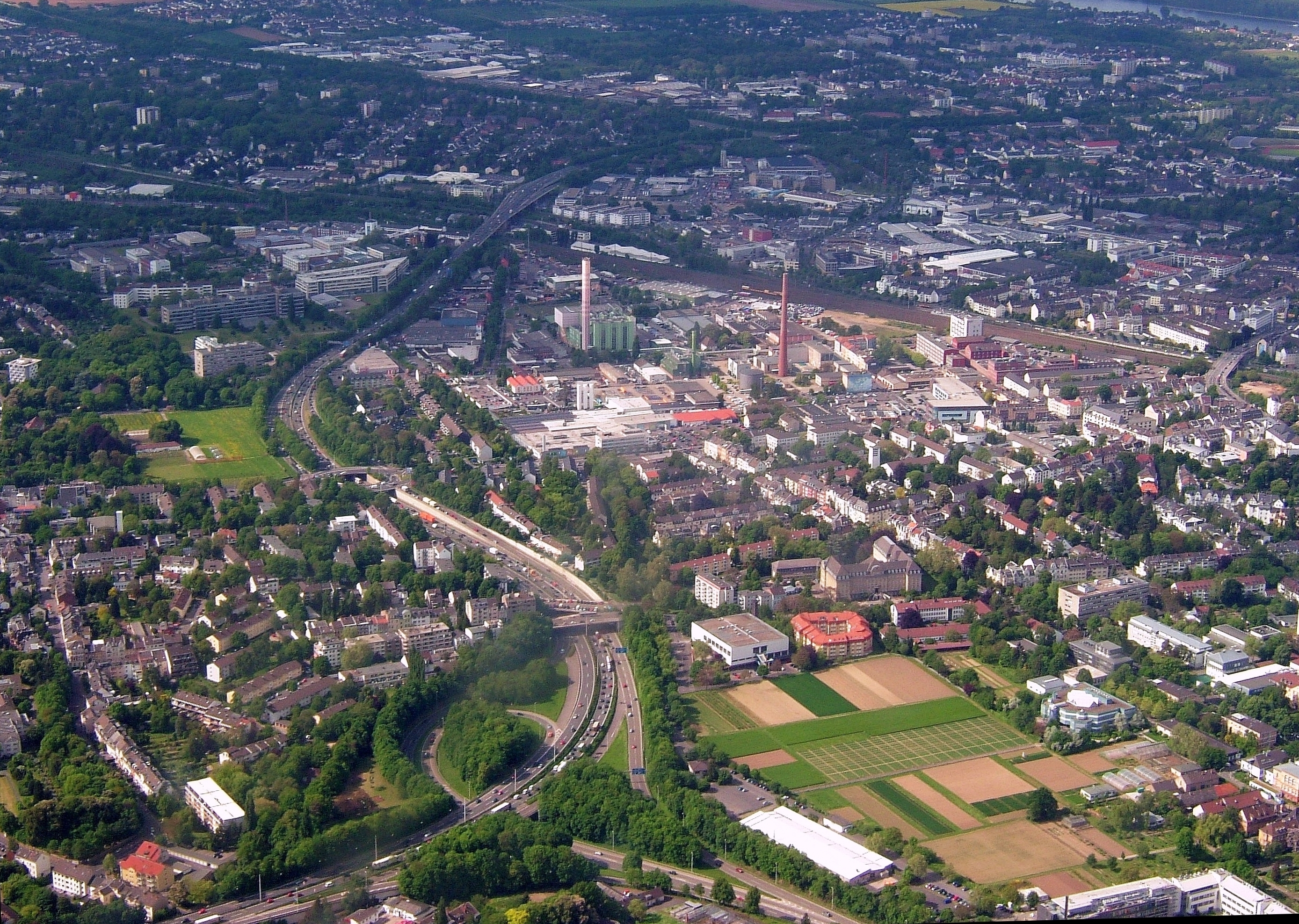 Bundesautobahn 565: Bonn-Endenich, Endenicher Ei, Brücke der Endenicher Allee und des Wiesenwegs (sogenannte Hosenbrücke), Anschlussstelle Poppelsdorf (Reuterstraße), Müllverbrennungsanlage